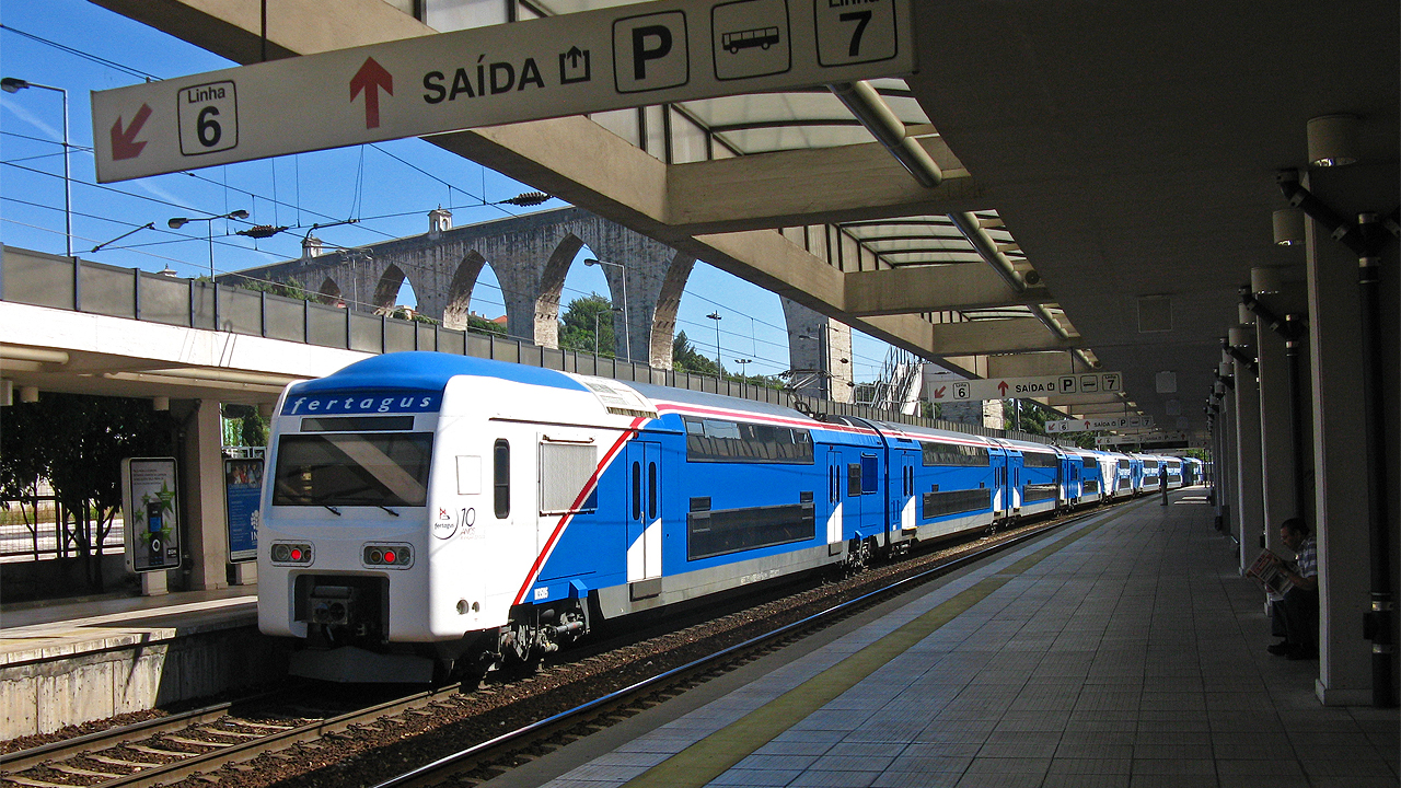 UQE 3505 + UQE 35?? com destino a Coina Campolide 07/07/2009